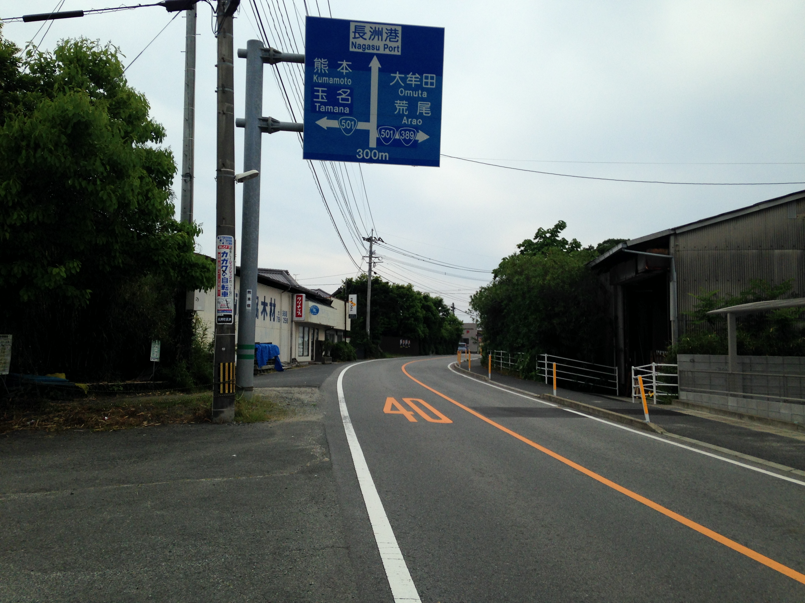 長洲町内の熊本県道46号